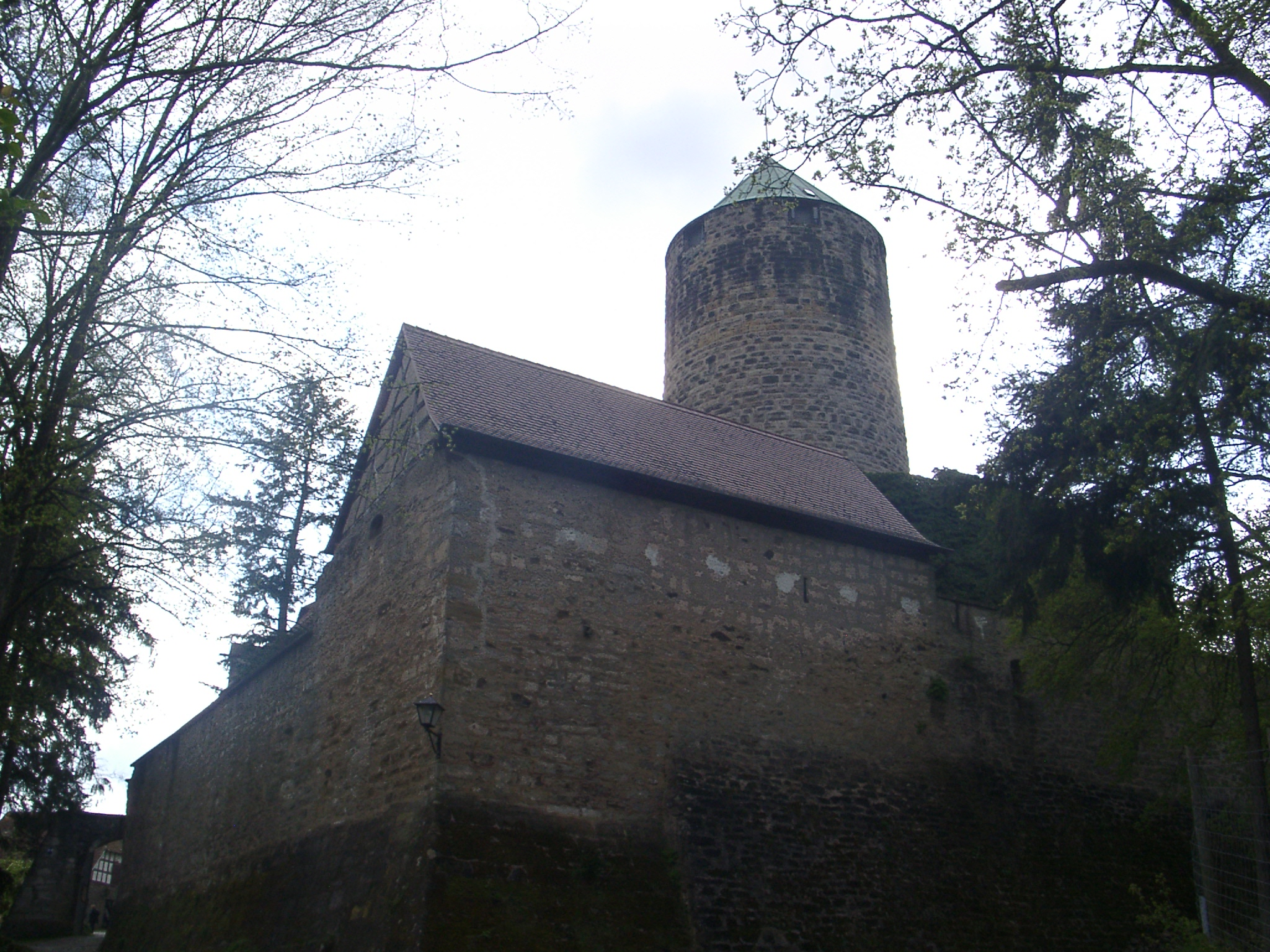 Burg Colmberg